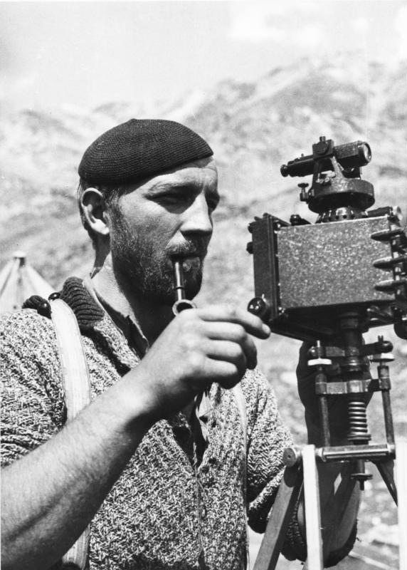 Tibetexpediton, Wienert mit Photogrammeter Pennam, Wienert am Instrument (Photogrammeter) [Fotogrammetrie, Bildmessung]